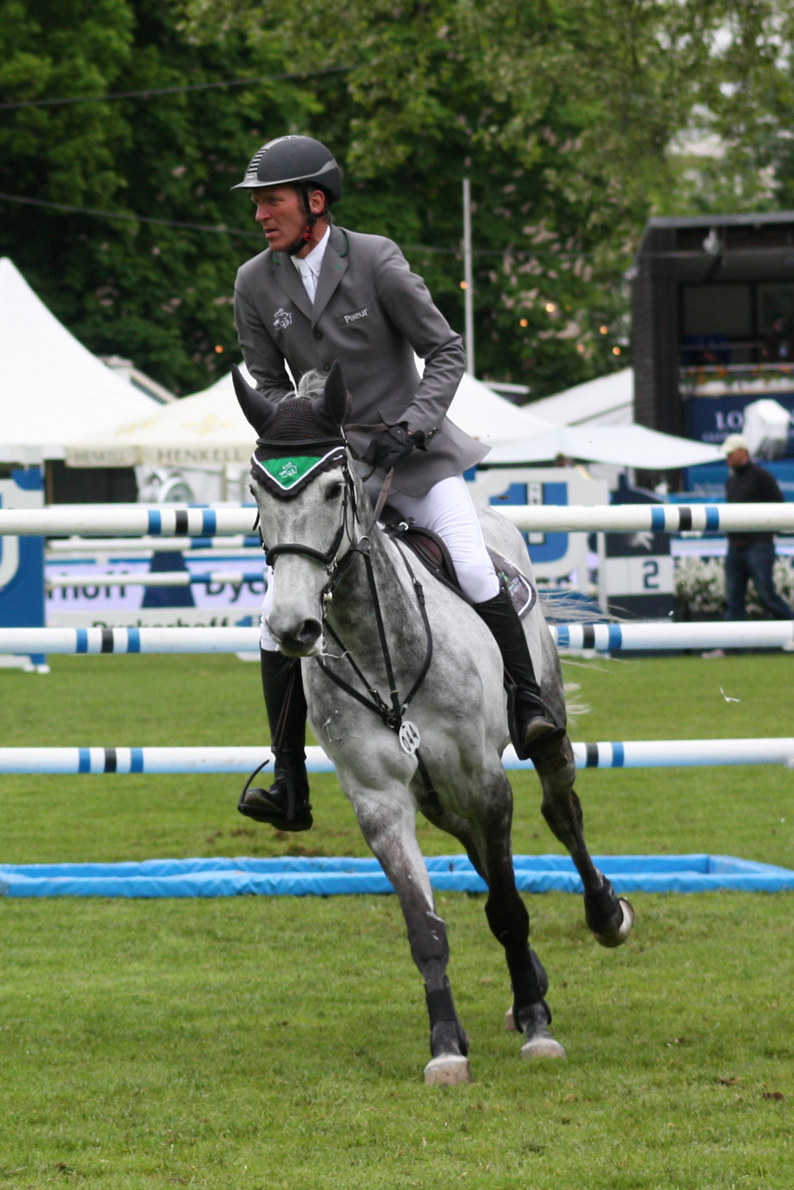 77. Internationanles Wiesbadener Pfingstunier 2013, CSI***** Eröffnungsspringen, Ludger Beerbaum auf Chiara Personality rights warningAlthough this work is freely licensed or in the public domain, the person(s) shown may have rights that legally restrict certain re-uses unless those depicted consent to such uses. In these cases, a model release or other evidence of consent could protect you from infringement claims.